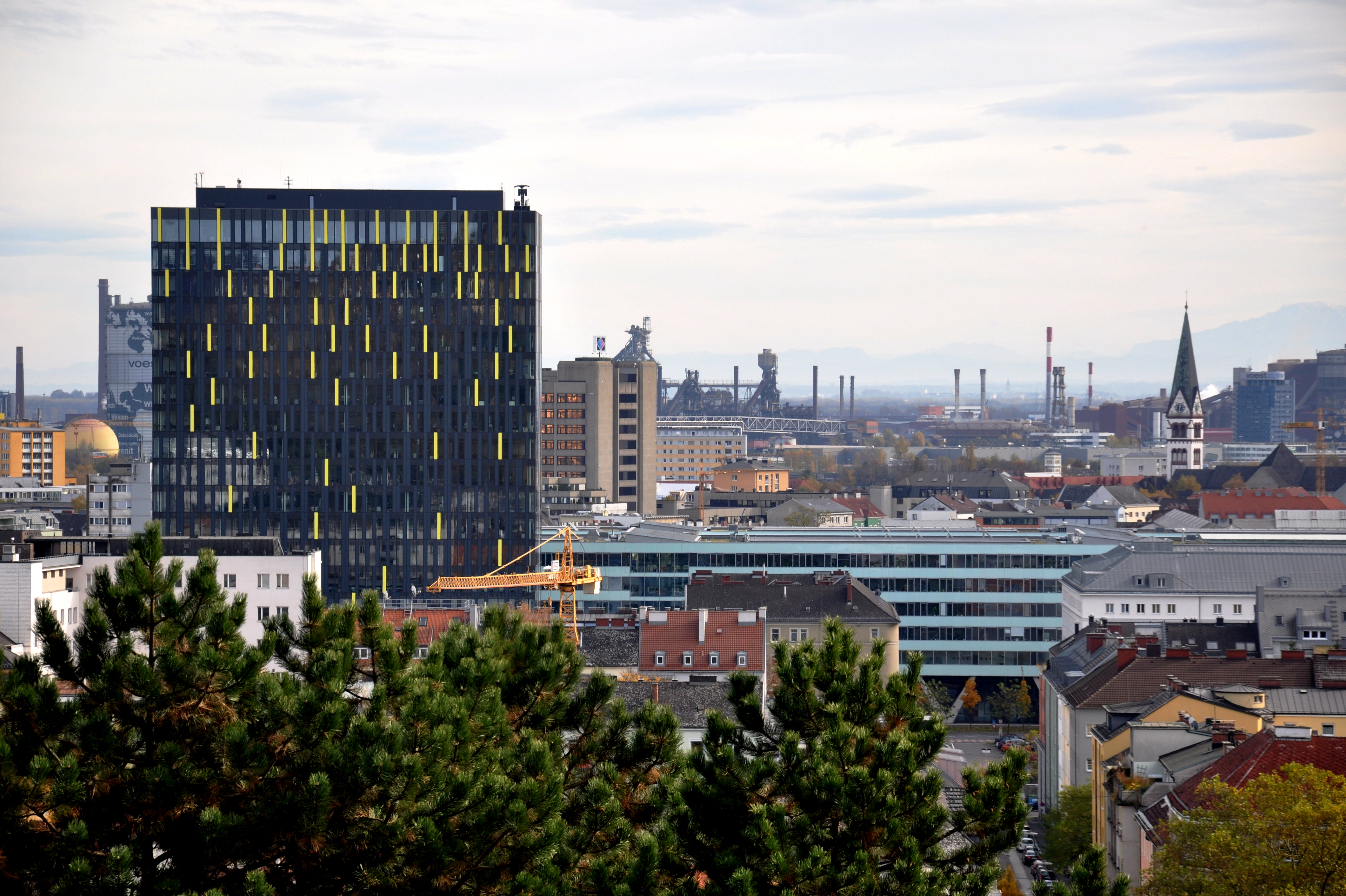 Linz, Blick vom Balzarekrondeau (an der Straße Auf der Gugl; Teil der Parkanlage am Bauernberg) auf den Power Tower und Industrieanlagen